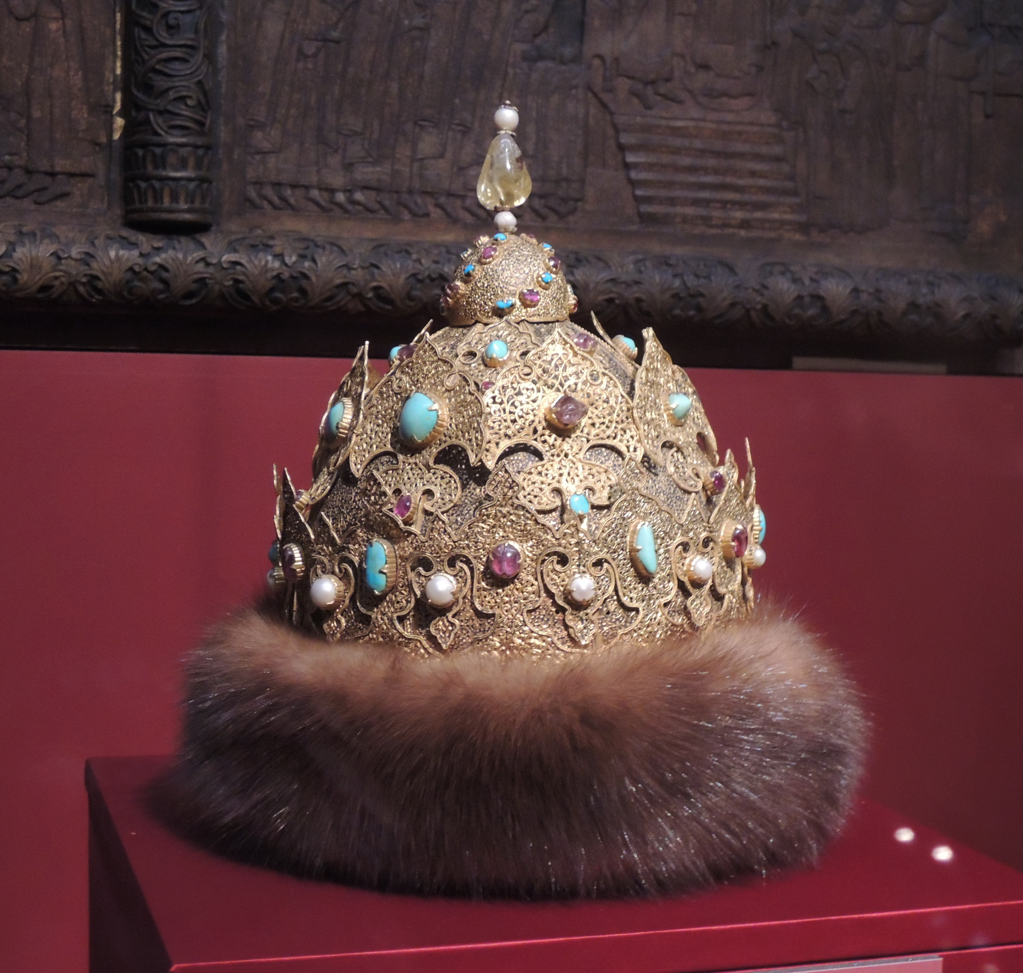 Шапка Казанская